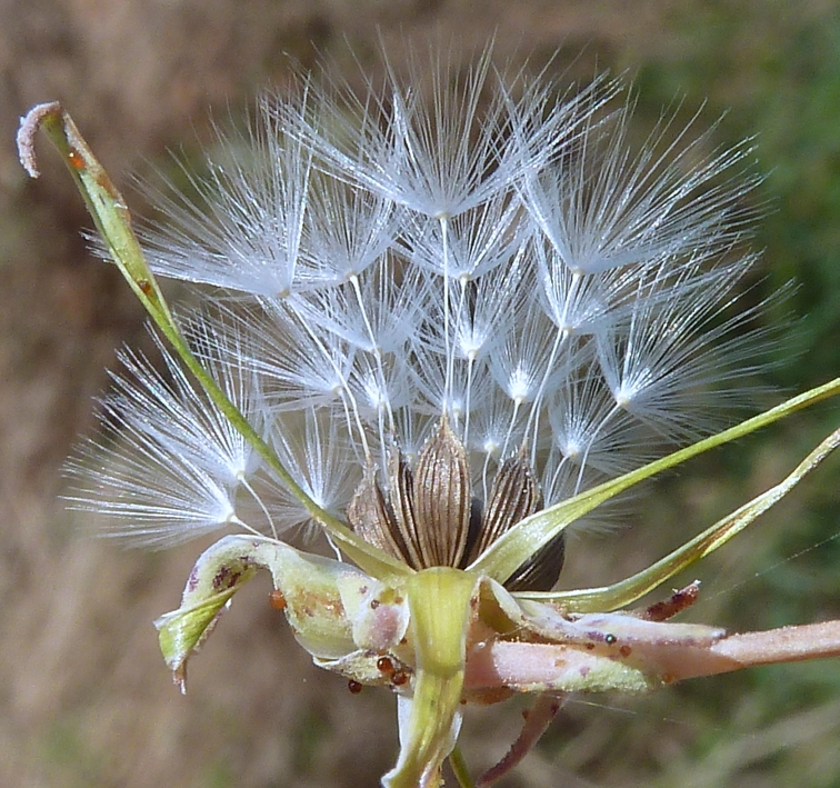 Lactuca serriola (serrallones) : Cipselas in situ - Camino del Rincón, Albatera (Alicante, España).